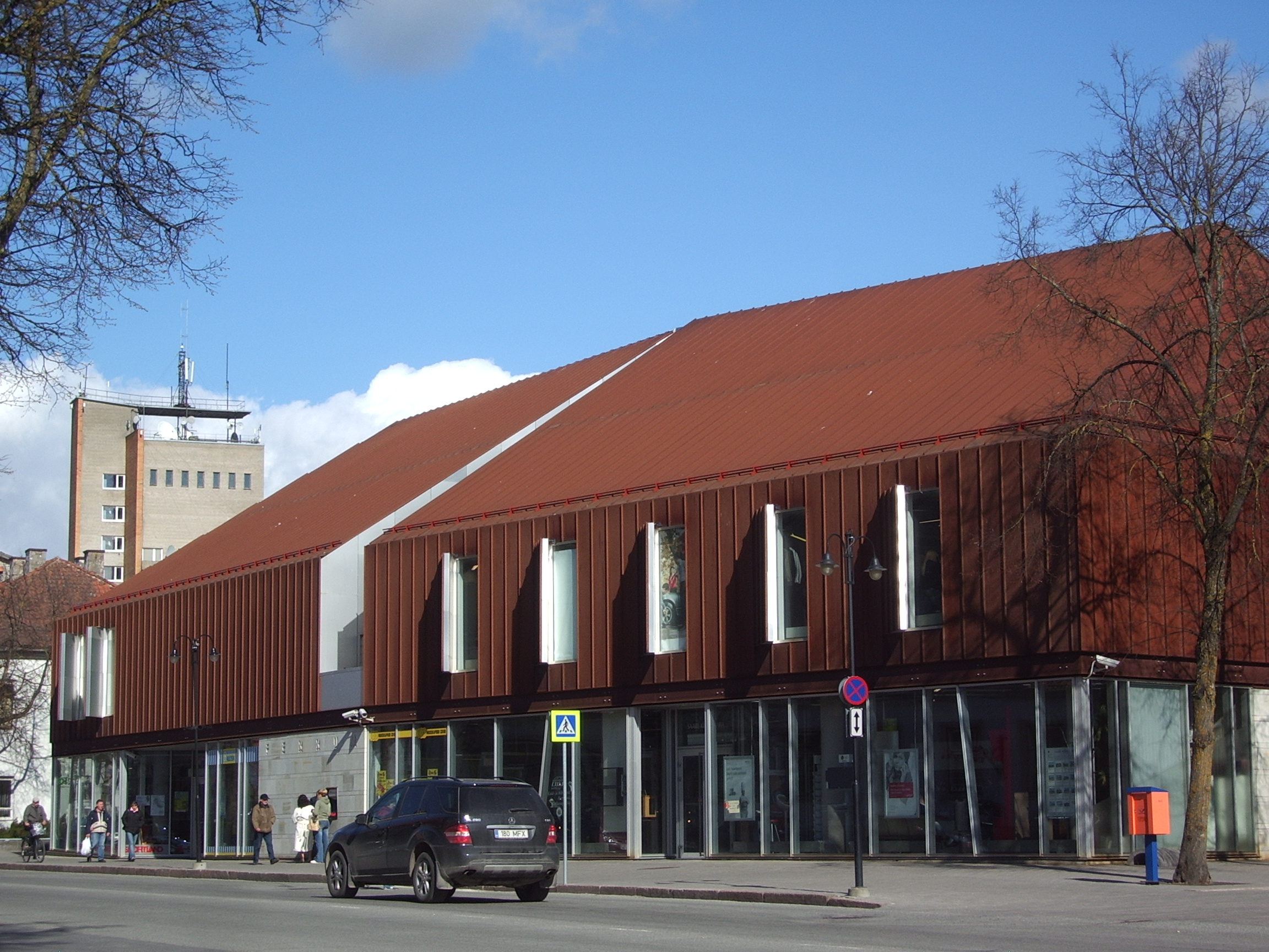 Ferrum Kuressaare kesklinnas, Tallinna tänav 8. Arhitektid: Indrek Rünkla, Andres Alver, Tiit Trummal, Tarmo Laht ja Ulla Mets.